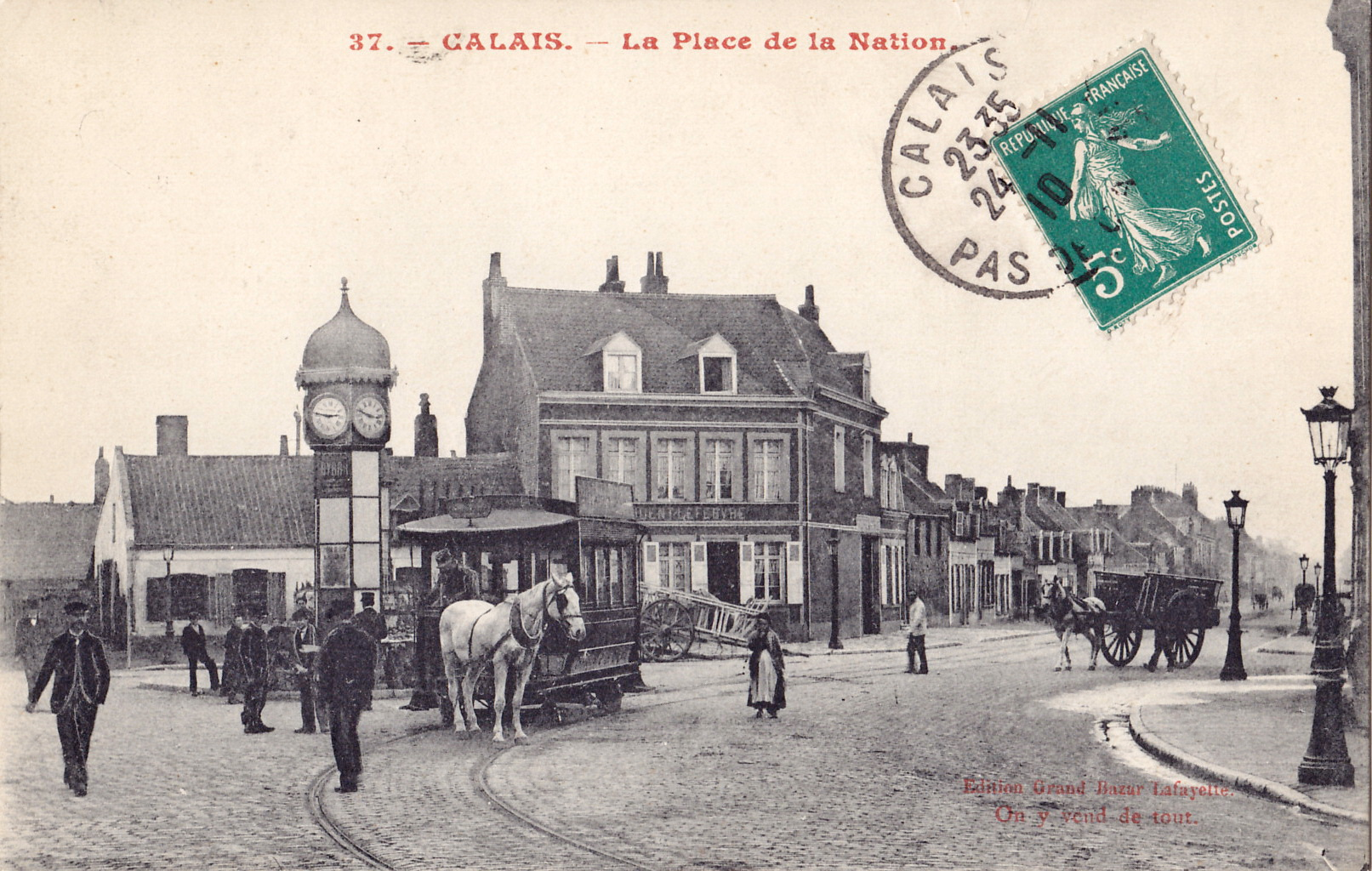 Carte postale ancienne éditée par Grand Bazar Lafayette, n°37 :CALAIS - La Place de la Nation